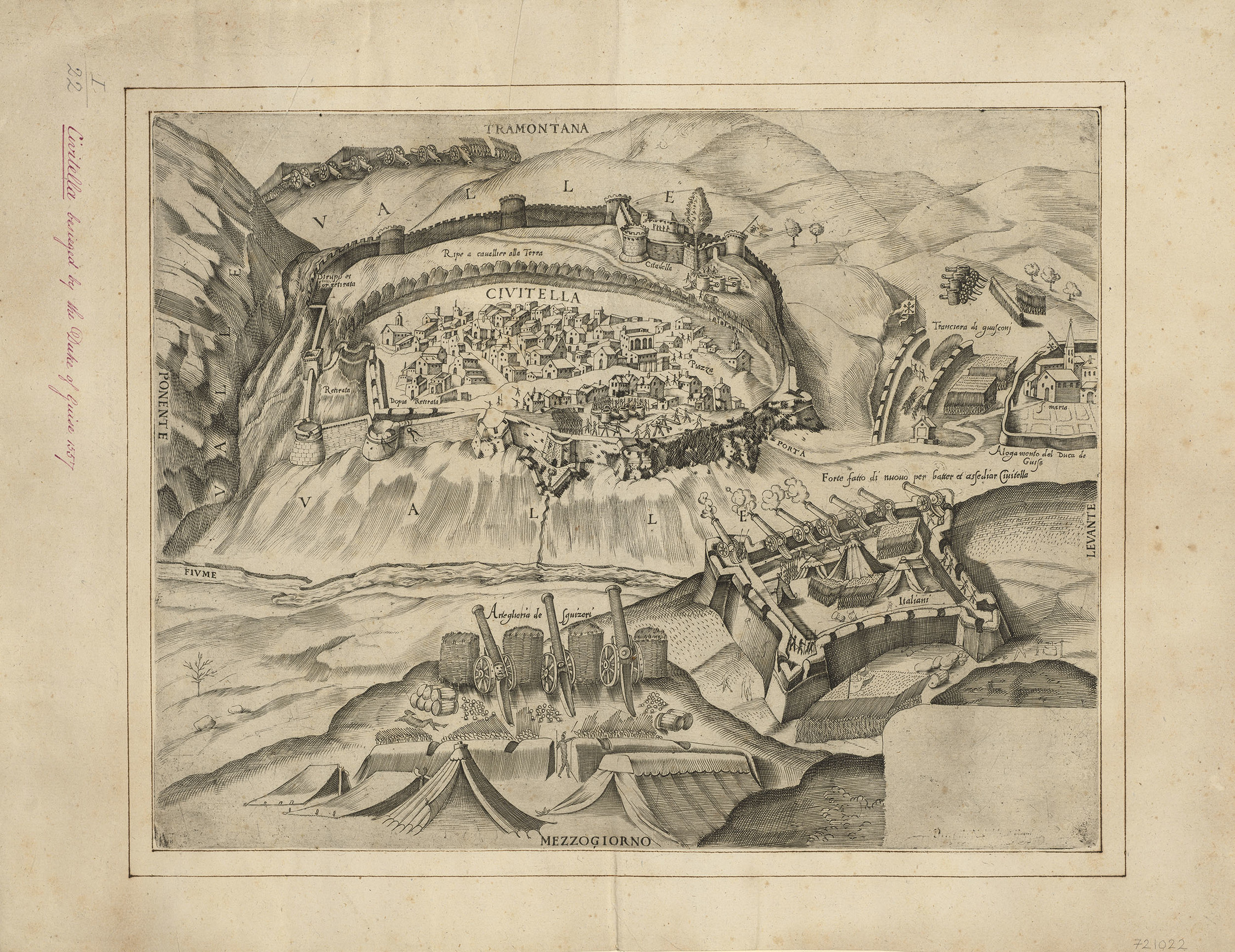 Asedio de la fortaleza de Civitella durante en 1557 durante la ultima guerra italiana.